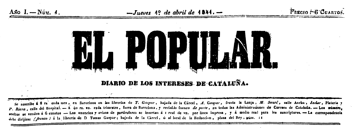 Cabecera del periódico El Popular se publicó en Barcelona en los años 1841 y 1842